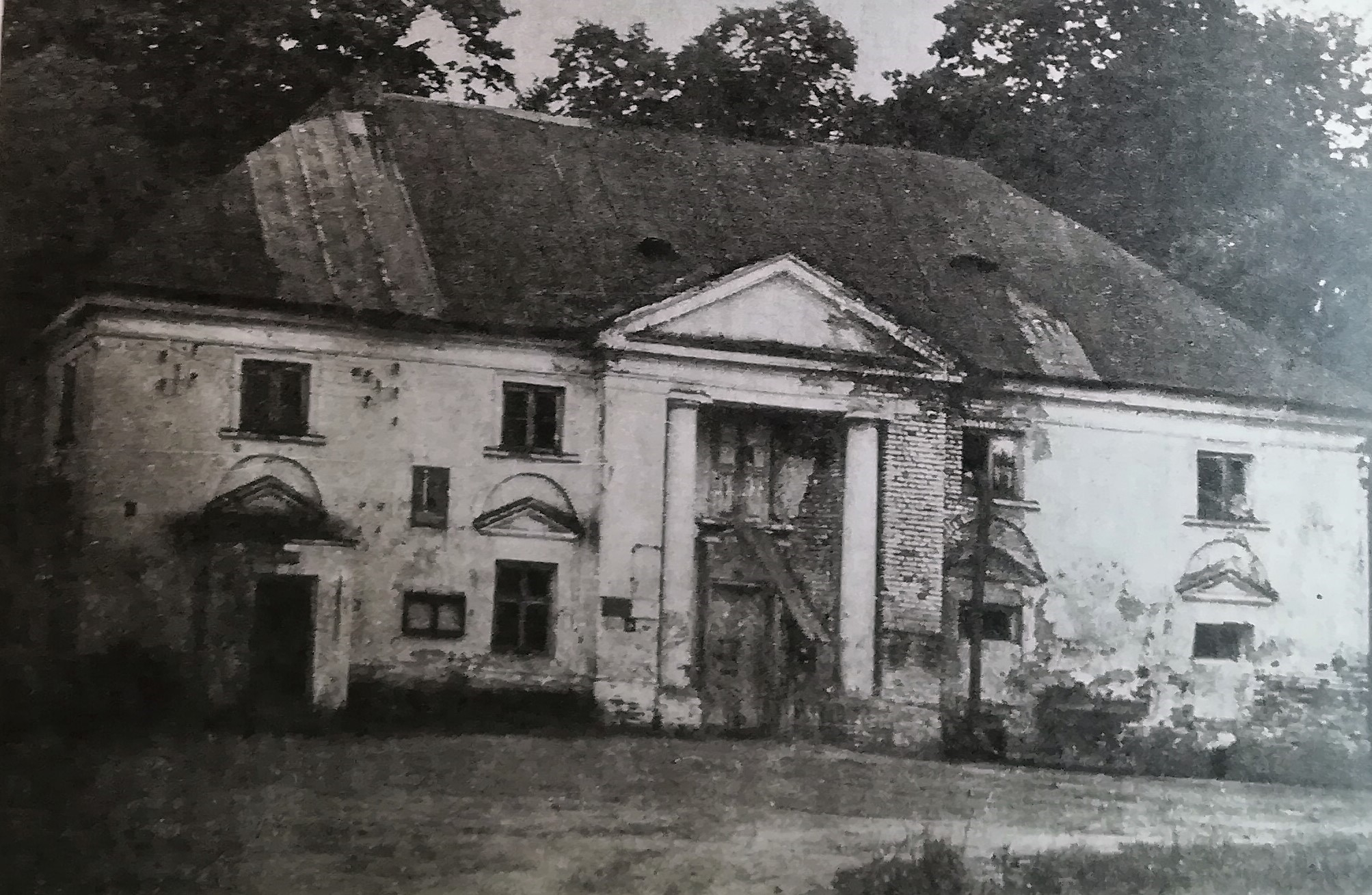 Spichlerz w Niechmirowie. 1990r. Dawna oficyna dworska.